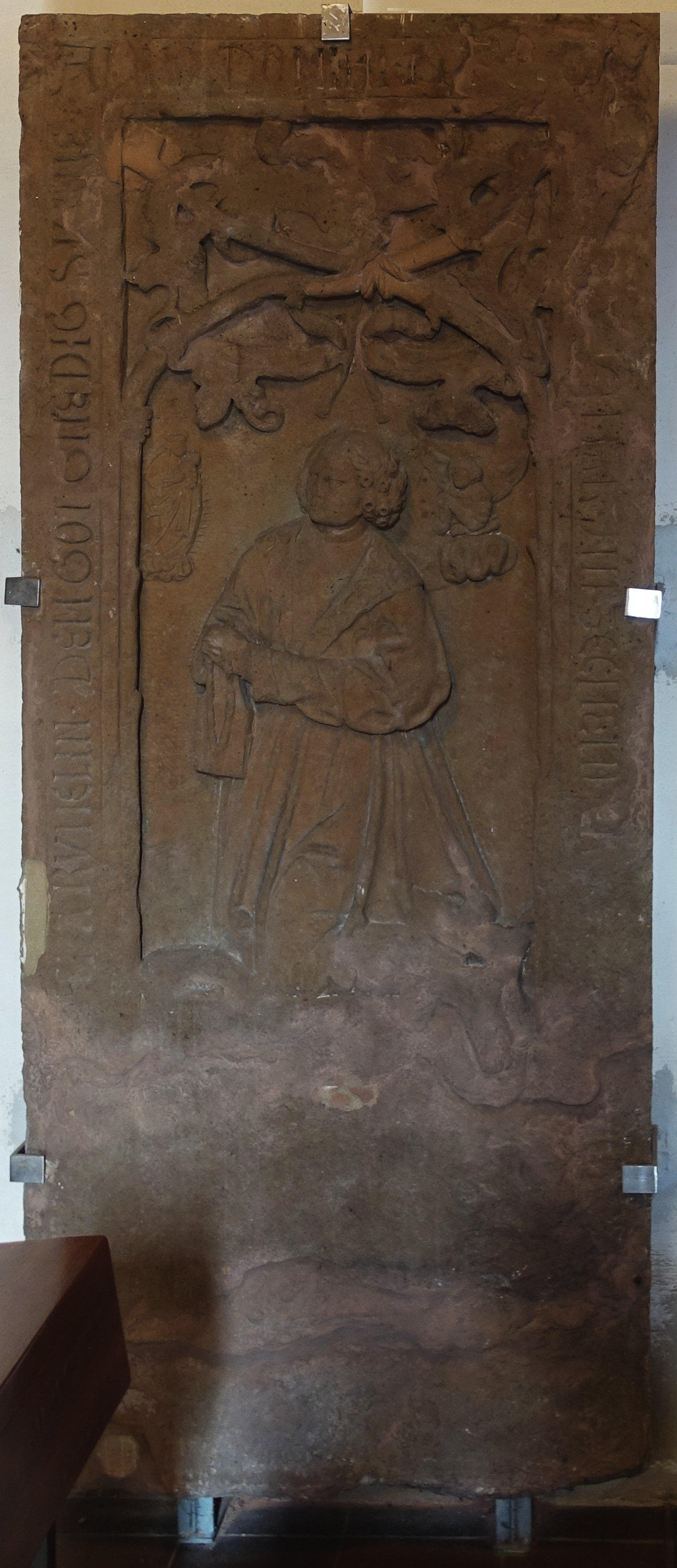 Epitaph an der Nordwand in der Uffkirche auf dem Uff-Kirchhof in Stuttgart-Bad Cannstatt für eine Person namens Rümelin.